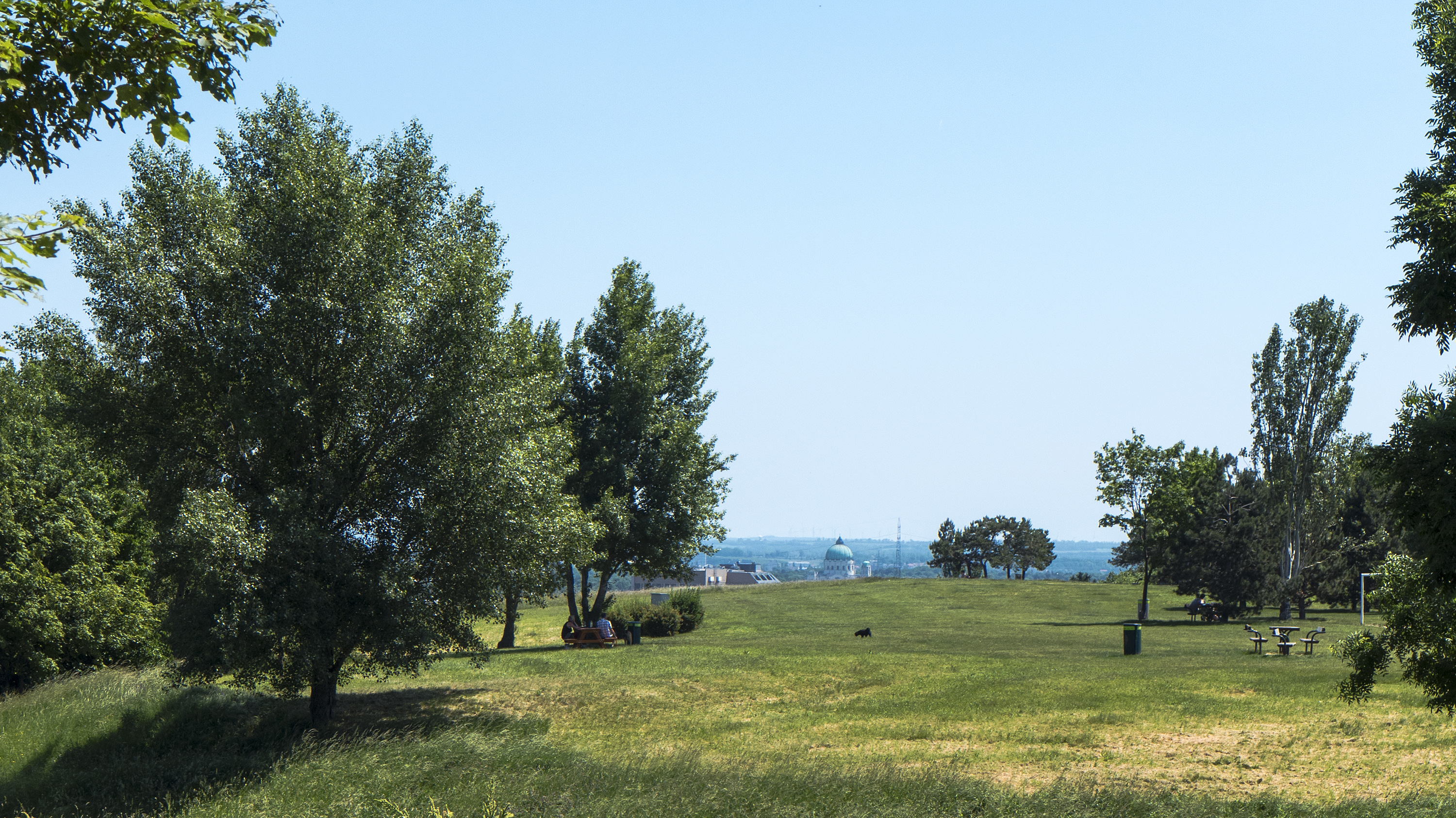 Parkanlage Löwygrube in Wien 10